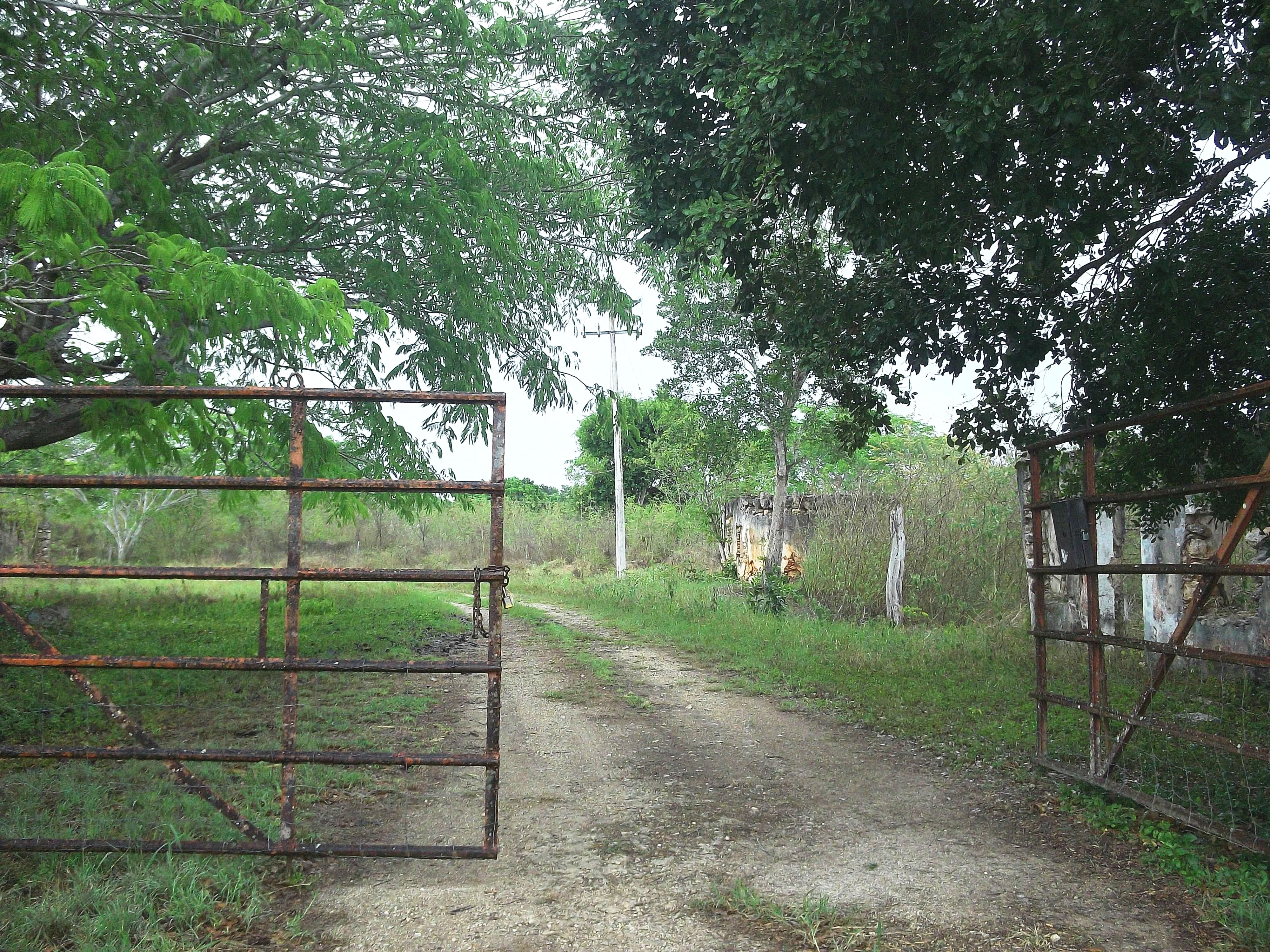 Entrada de Nohchan, Yucatán.